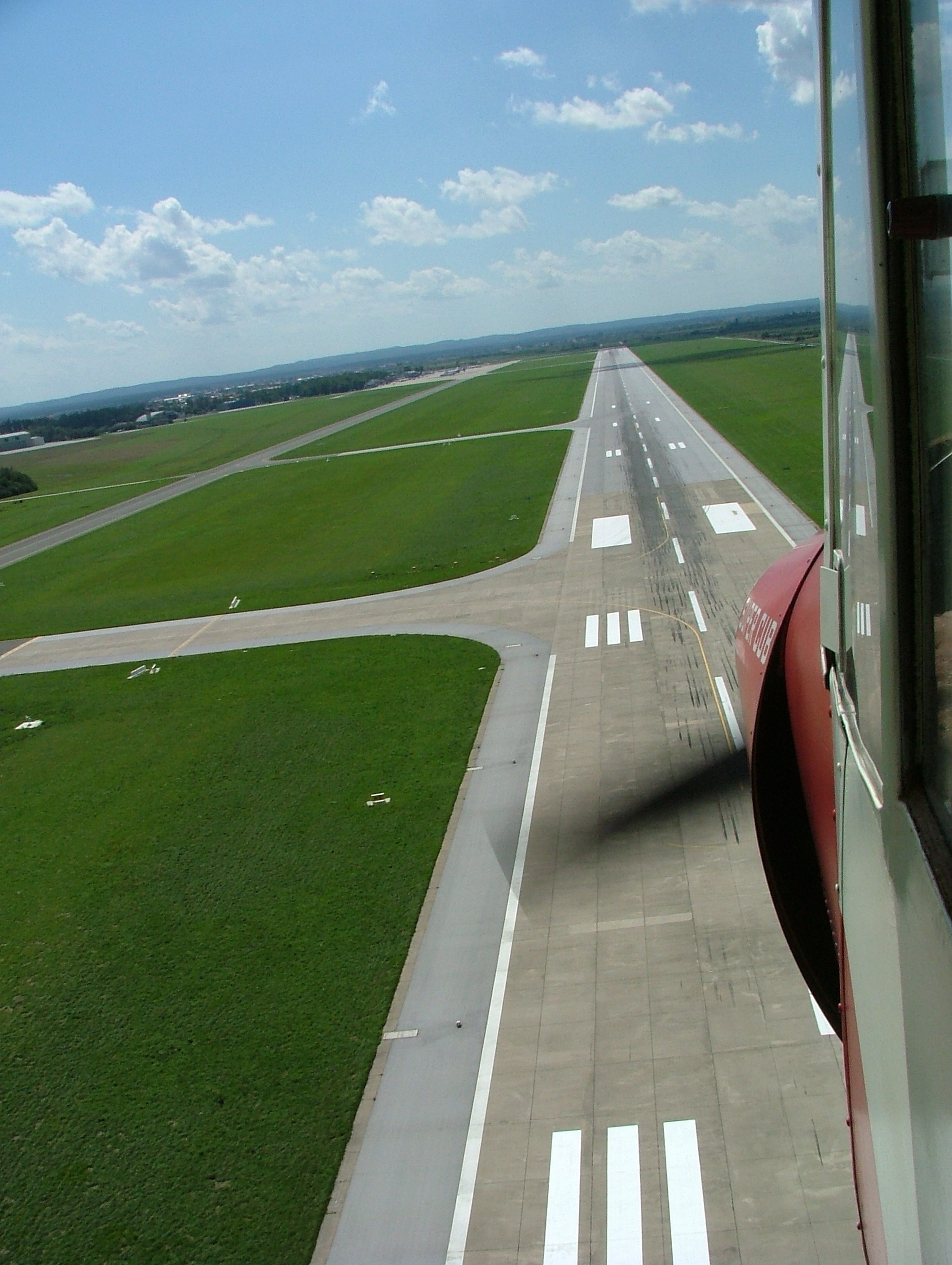 Runway